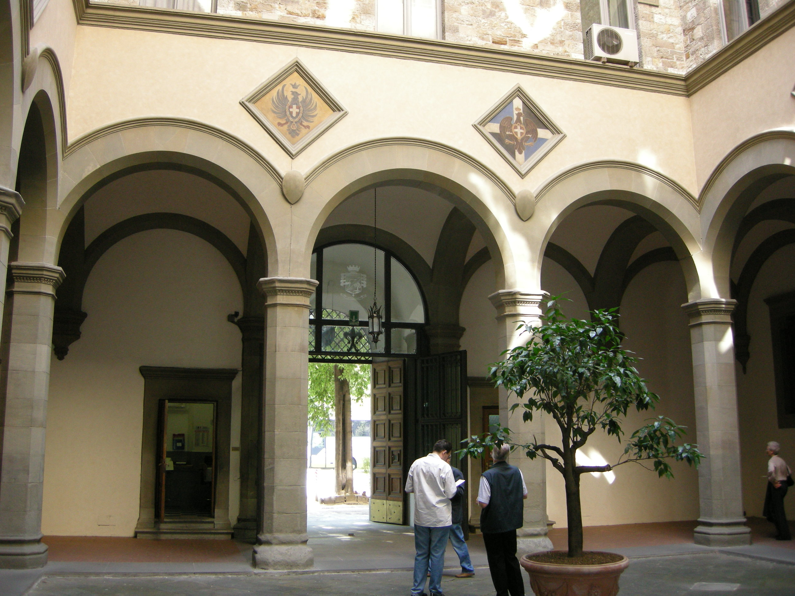 Caserna antonio baldissera, cortile